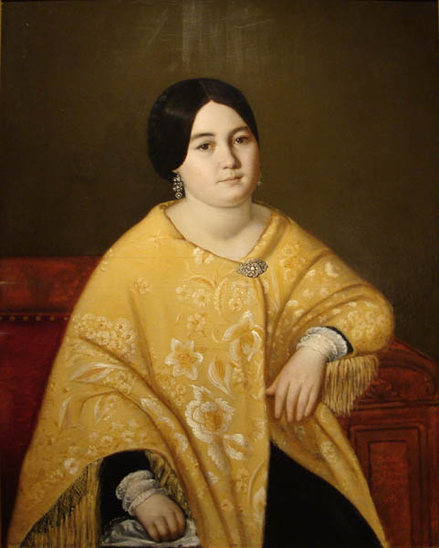 Mandiola